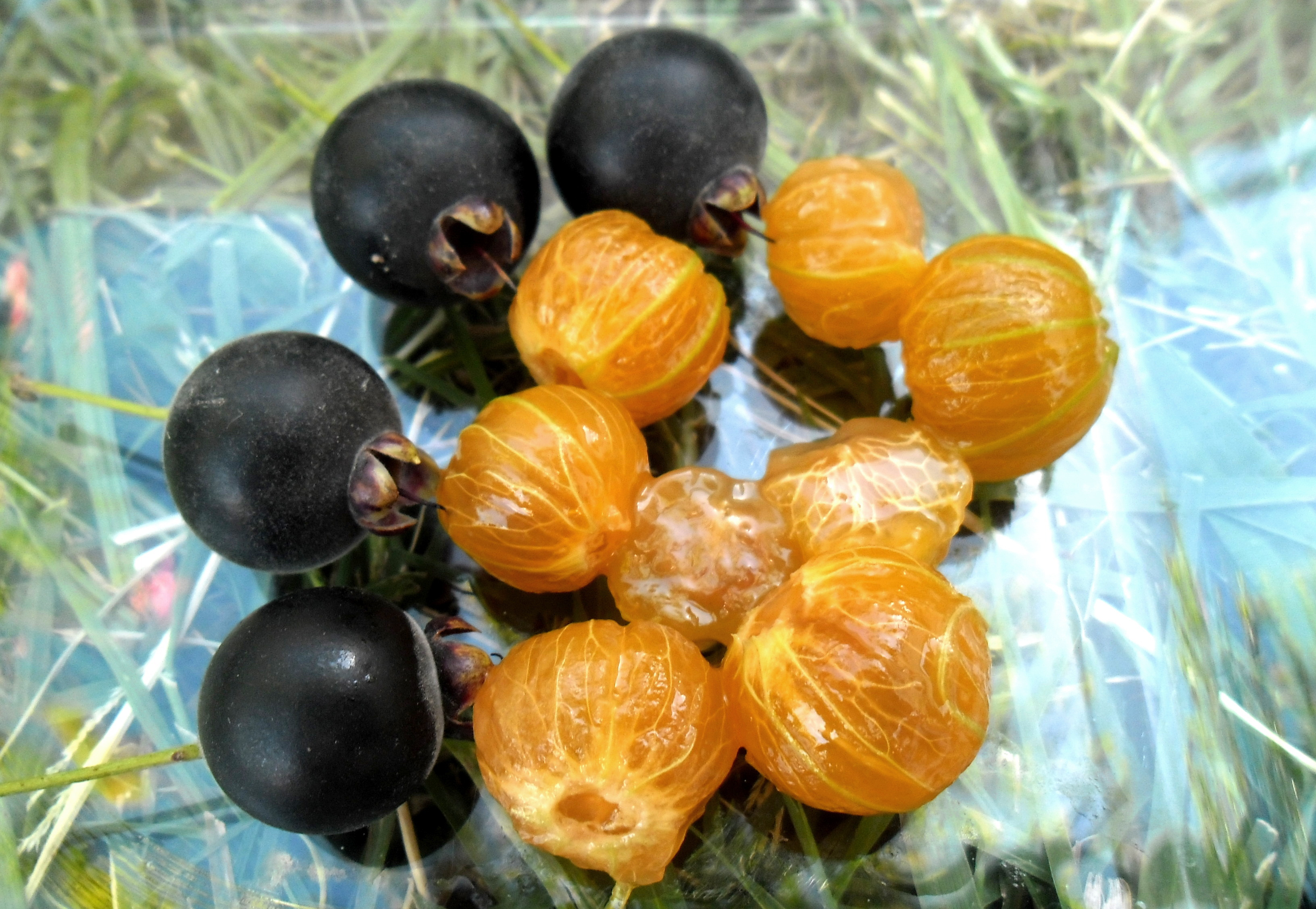 Foto de frutos de guaviyú con y sin piel, a mediados de enero, Pcia de Buenos Aires, Argentina